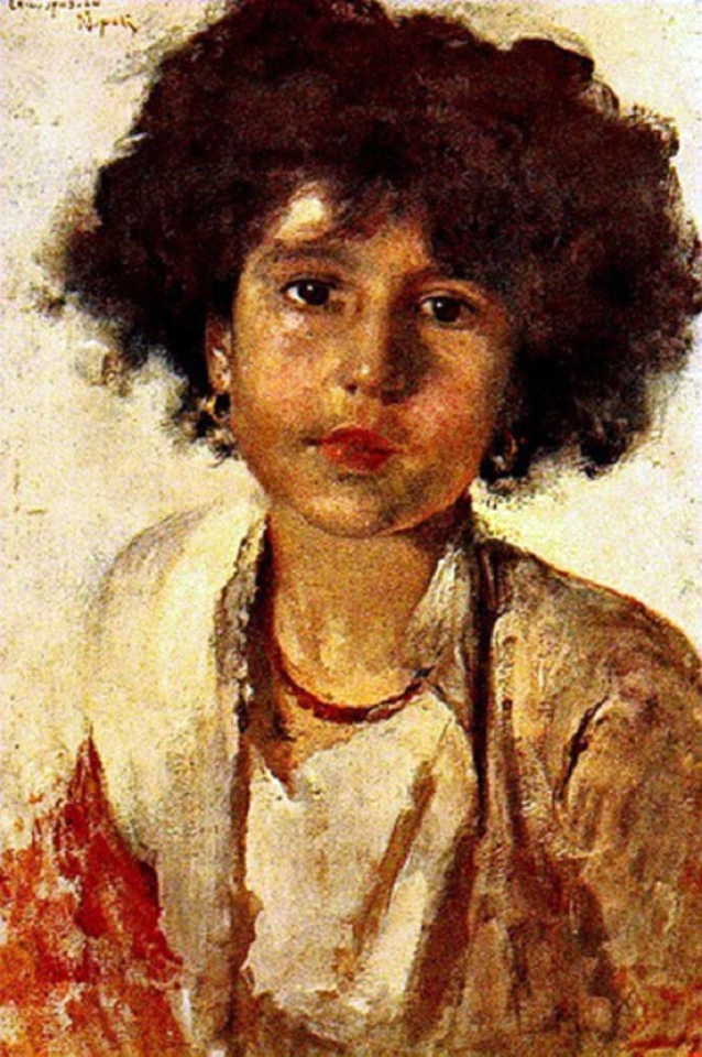 Busto di Fanciulla